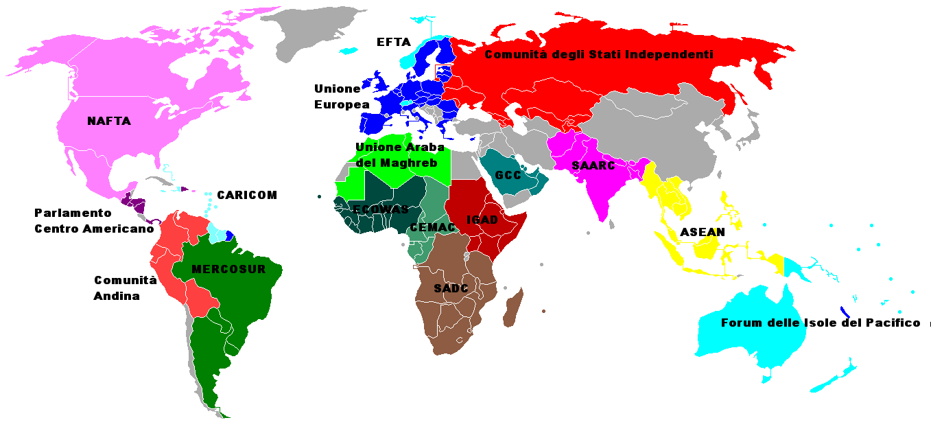 Cartina delle organizzazioni internazionali che raggruppano le nazioni di una regione del mondo.